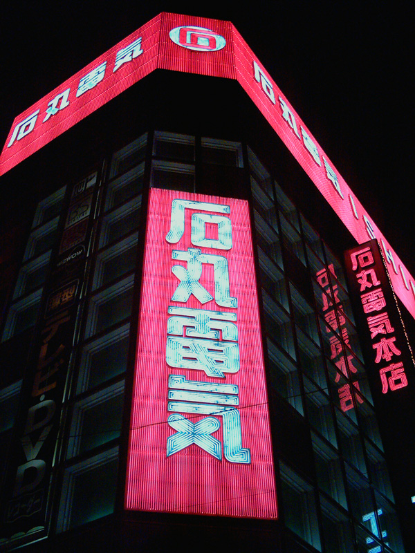 ISHiMARU Denki Akihabara in Japan